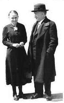 Gründer-Ehepaar der Bibelschule Beatenberg: Dr. phil. Gertrud und Dr. theol. Saturnin Wasserzug